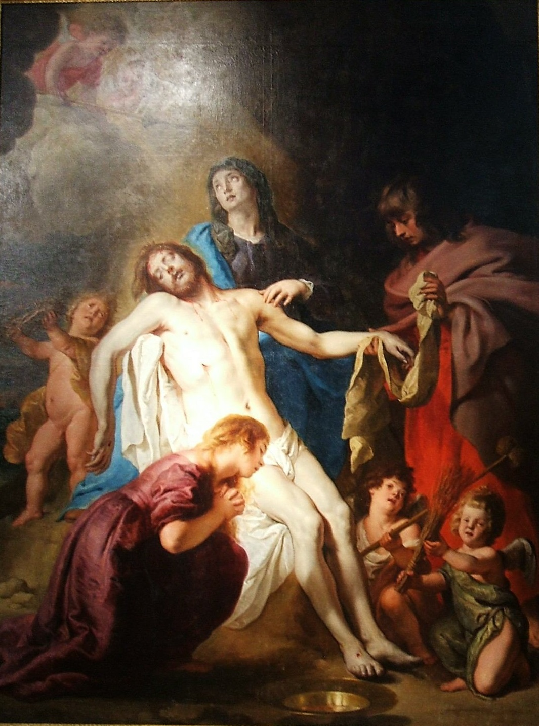 La obra representa el momento en que los familiares y discípulos de Jesucristo se lamentaron de su muerte junto a su cadáver.